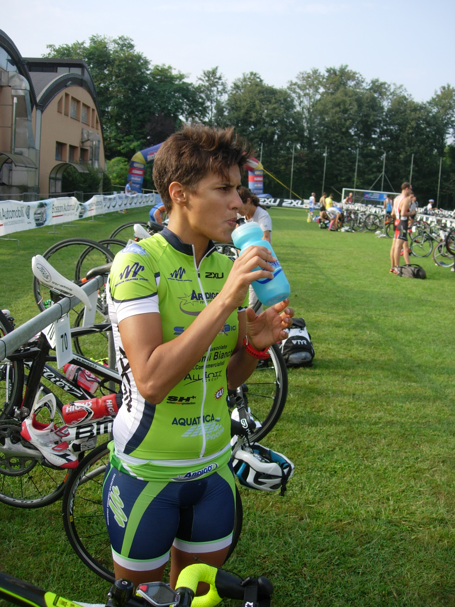 Veronica Signorini al Triathlon Sprint Città di Cremona